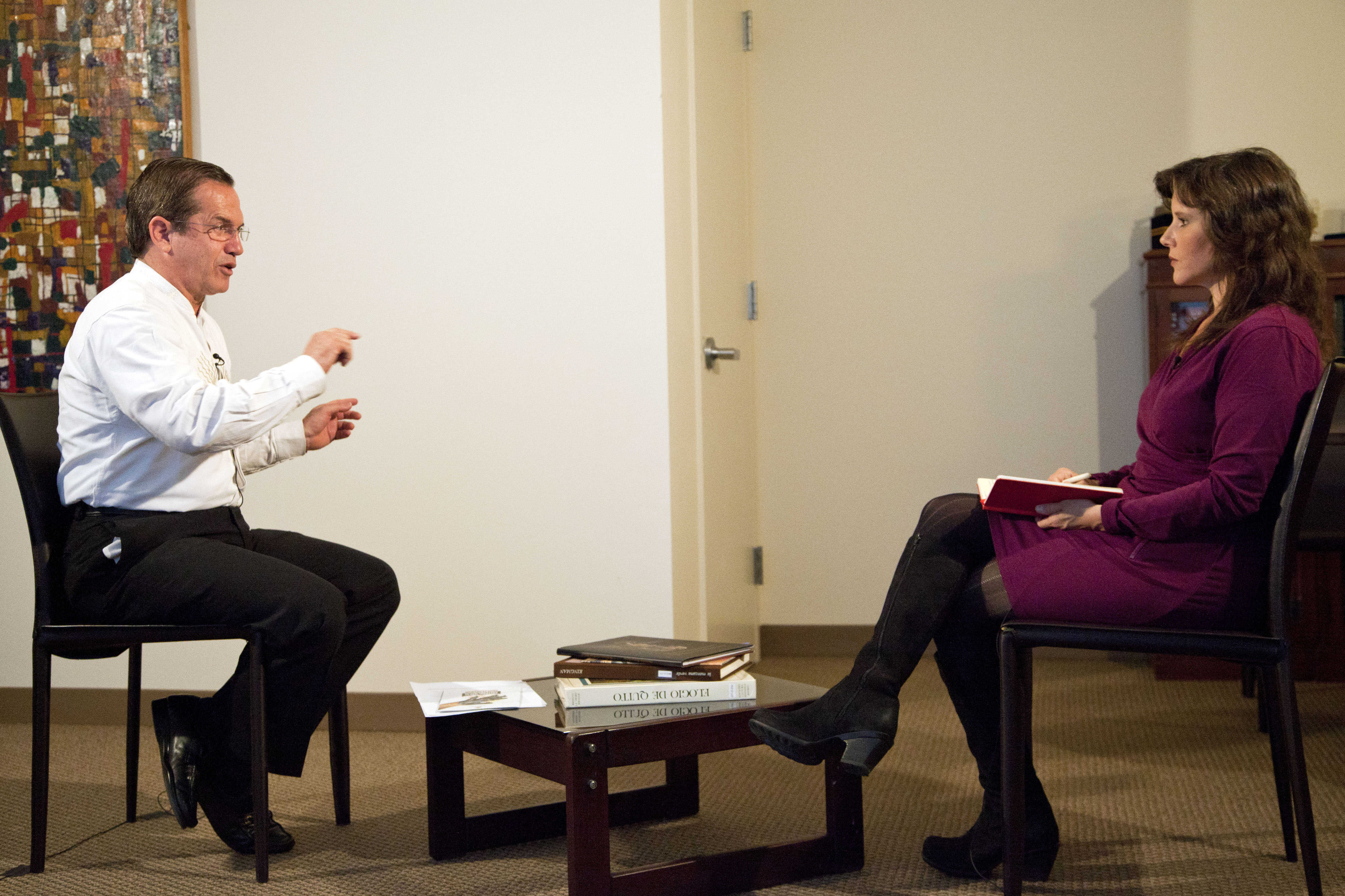 Nueva York (Estados Unidos), 24 de septiembre 2013. El Canciller del Ecuador, Ricardo Patiño, ofreció una entrevista para Eva Golinger de Russia Today TV, en el marco del 68 Período de Sesiones de la Asamblea General de la ONU. Foto: Fernanda LeMarie - Cancillería del Ecuador.